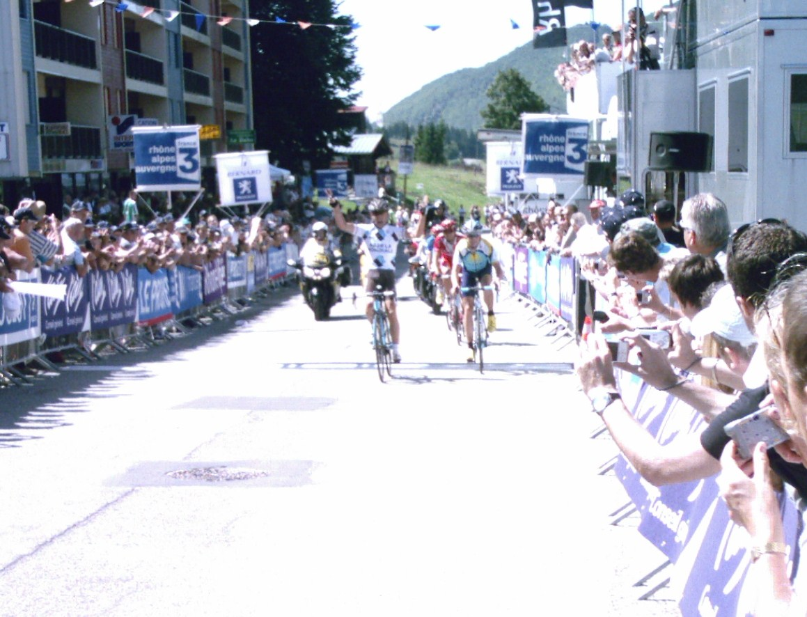 Arrivée de la troisième étape du Tour de l'Ain 2009 à Lélex.